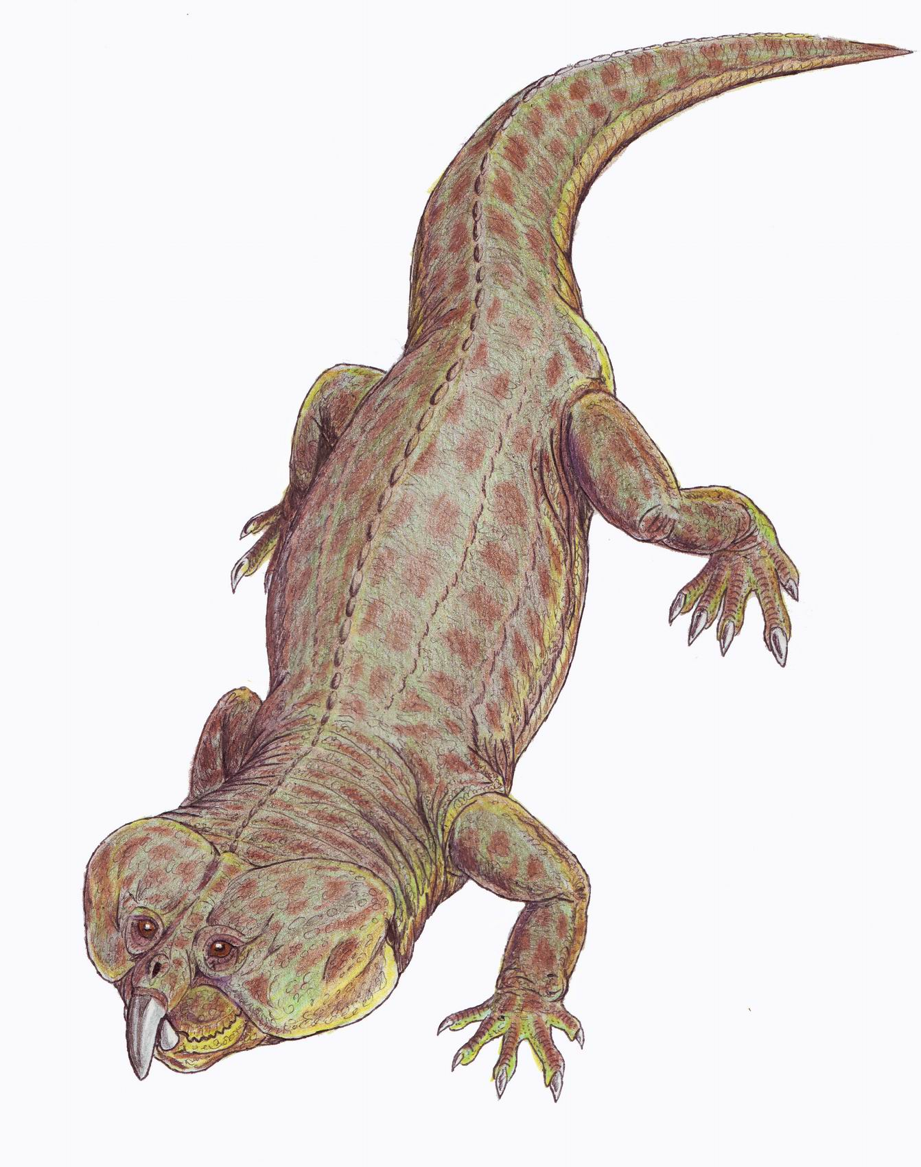 Paradapedon sp.